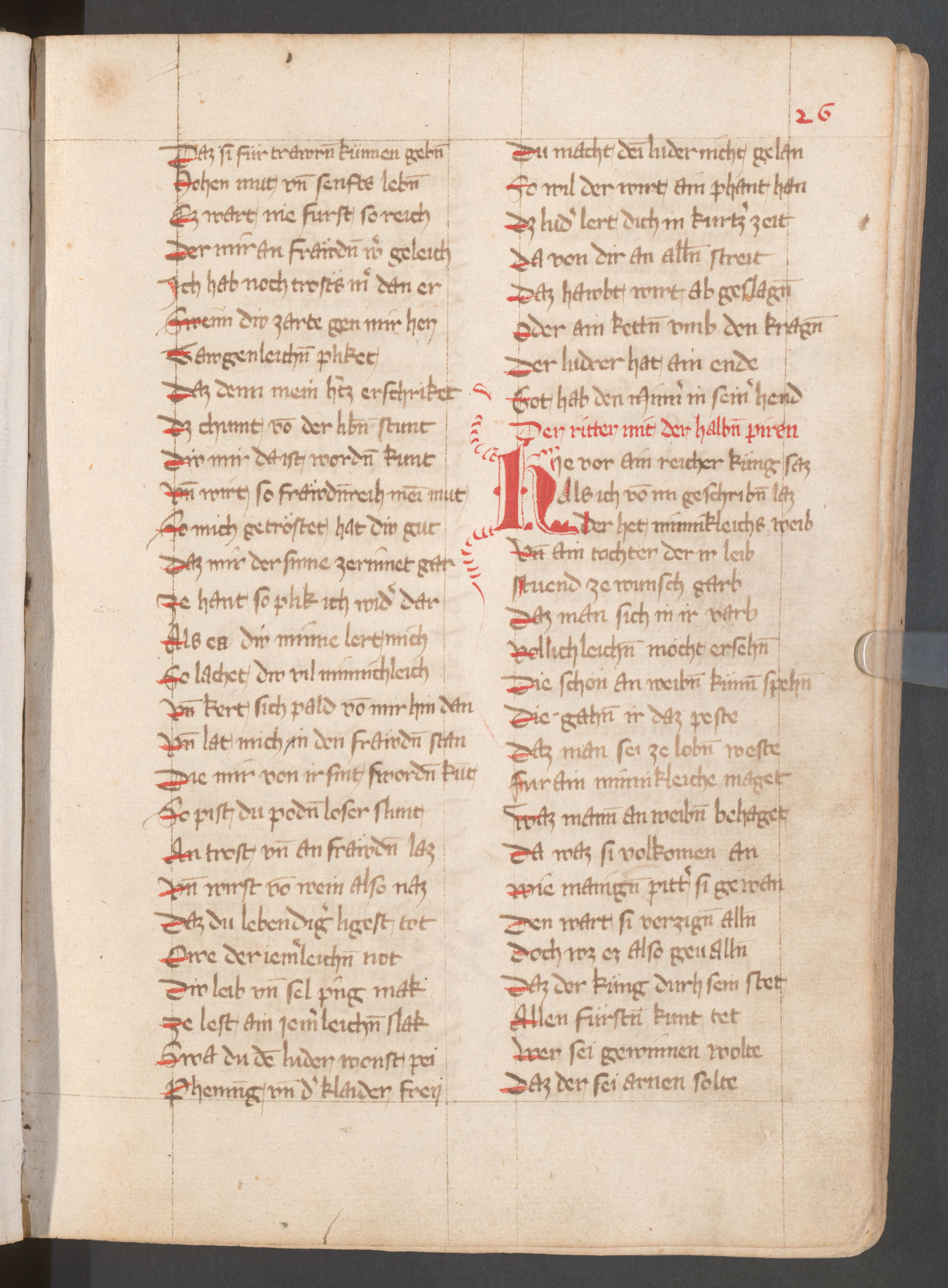 Erste Seite der "Halben Birne A", in Sammelhandschrift, Innsbruck 1393, Codex 2885 Wien, Österreichische Nationalbibliothek, f.26r.